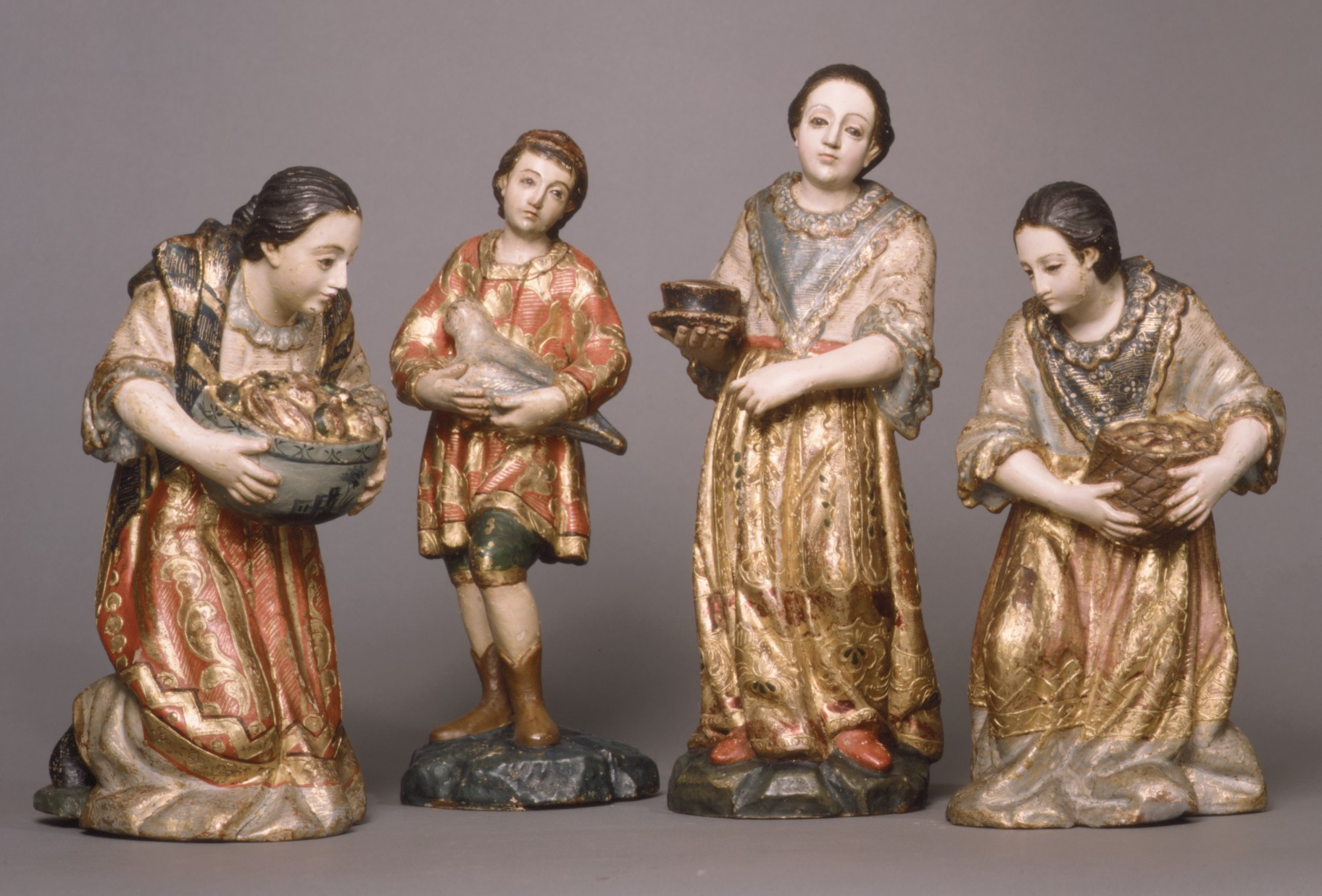 Guatemalan; Statuette; Sculpture